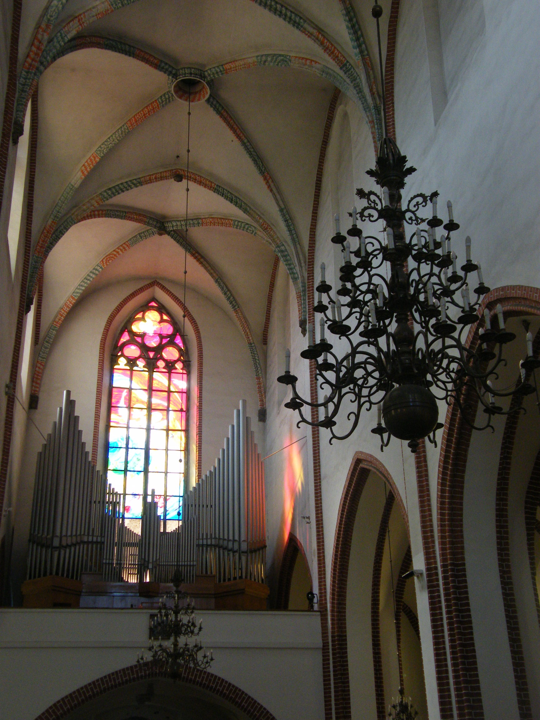 Wrocław, kościół p.w. Bożego Ciała, wnętrze